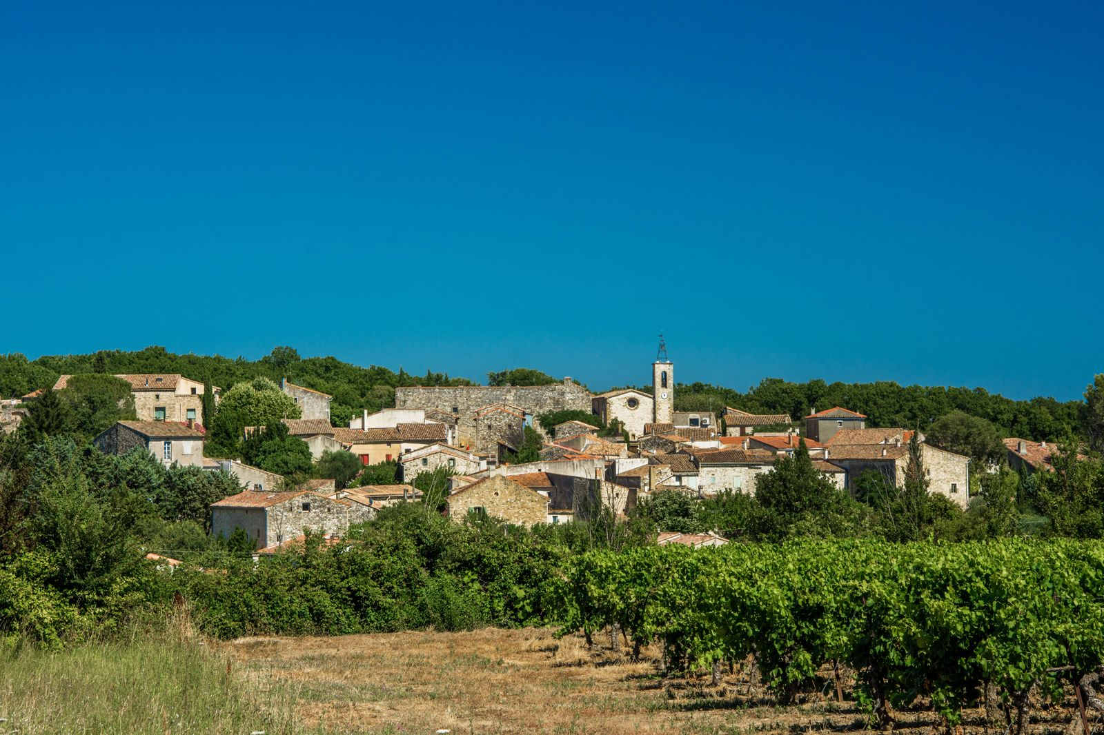 Collorgues